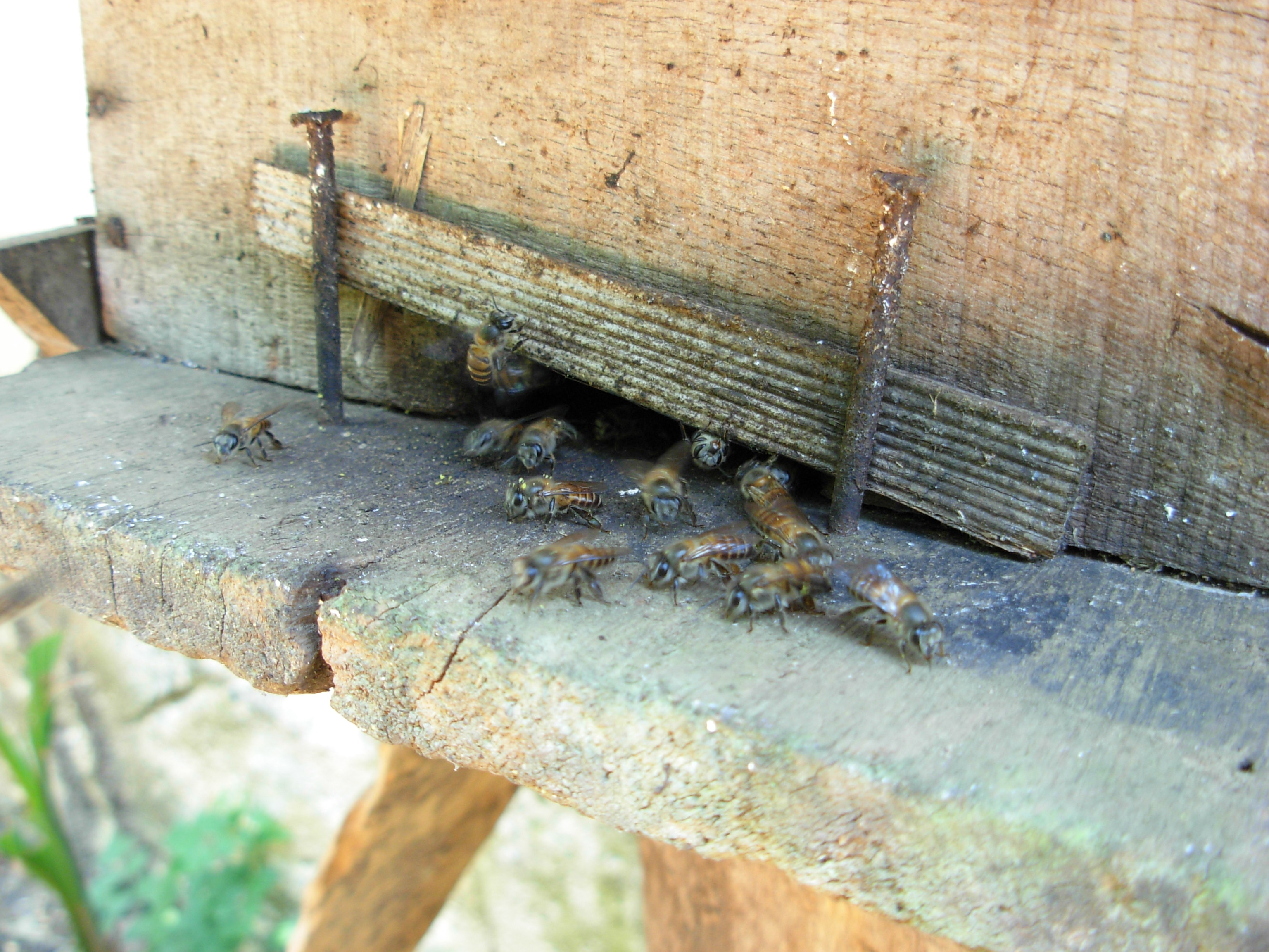 ഞൊടിയൽ തേനീച്ചകൾ തേനീച്ചക്കുടിന്റെ വാതിൽ കാക്കുന്നു.